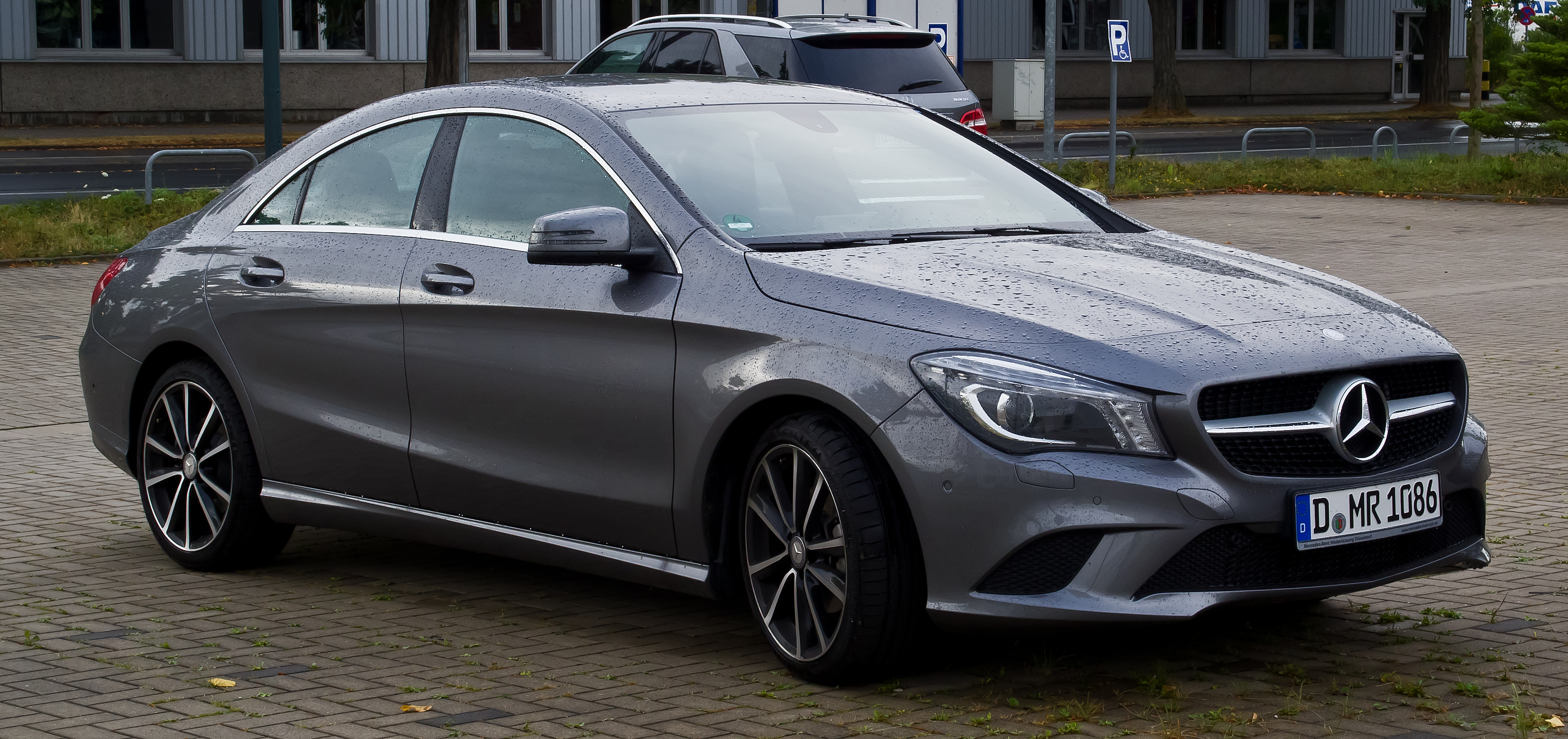 Mercedes-Benz CLA 180 Urban (C 117)